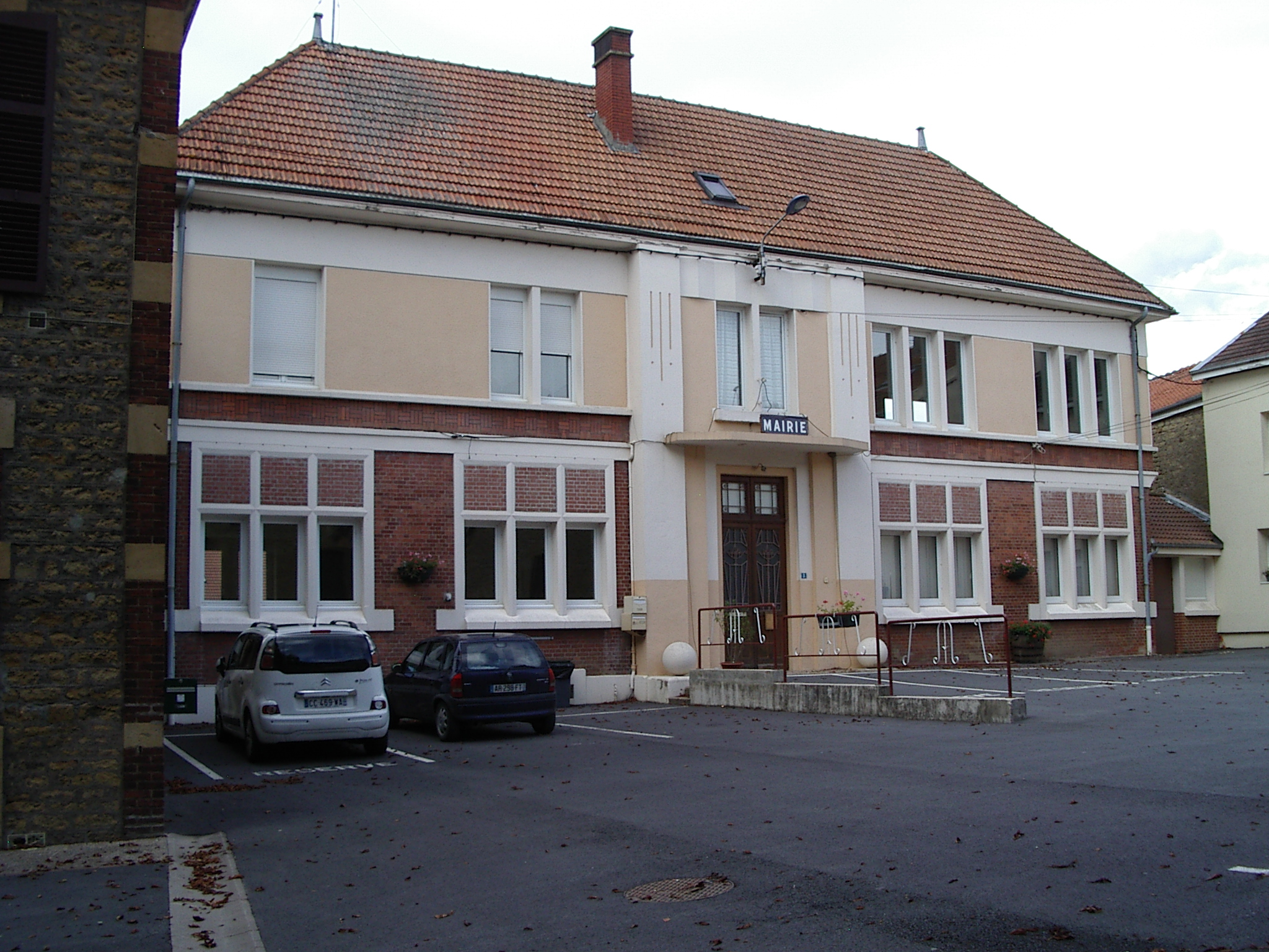 Mairie : Blagny est une commune française, située dans le département des Ardennes et la région Champagne-Ardenne.